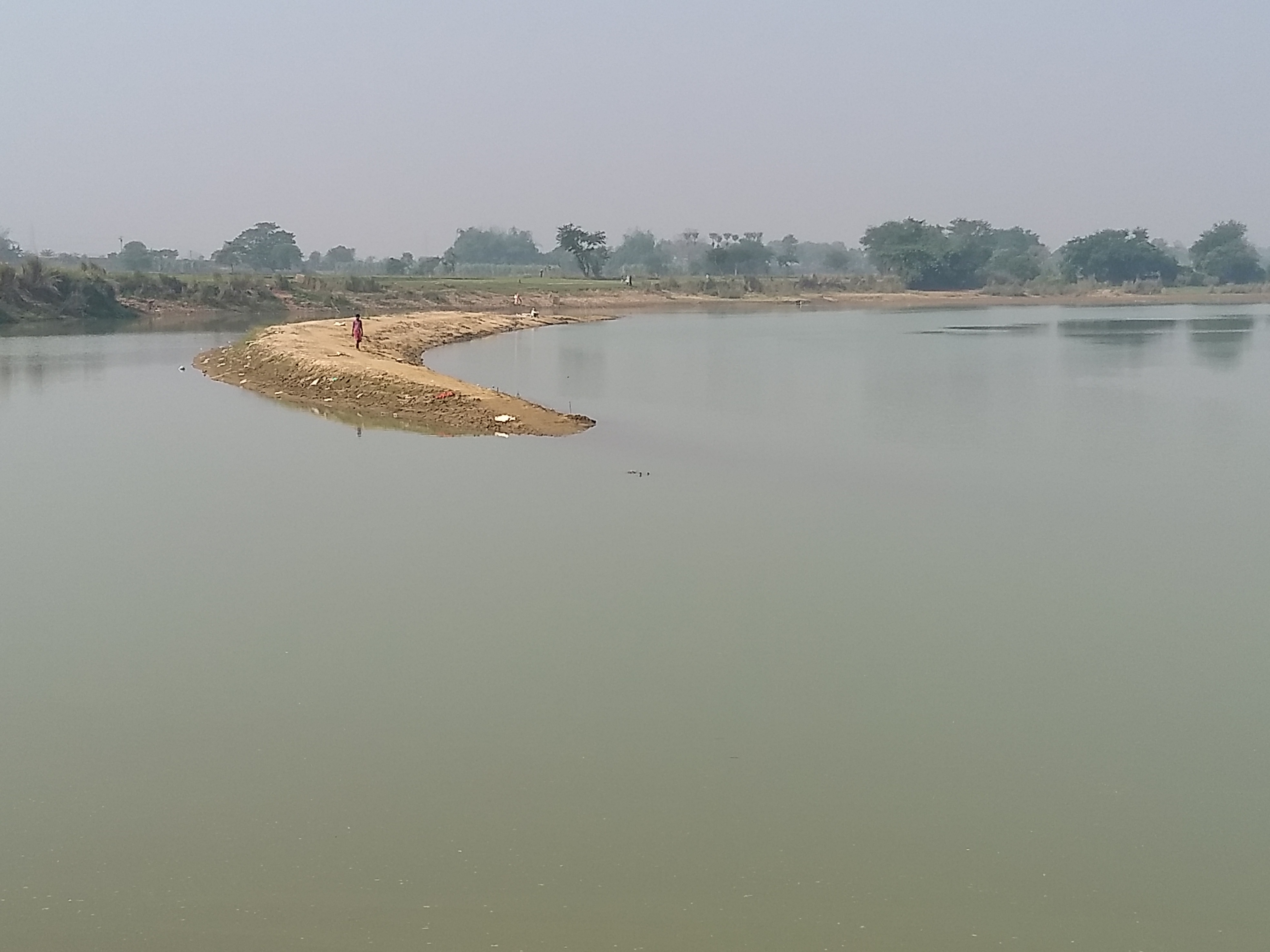 river